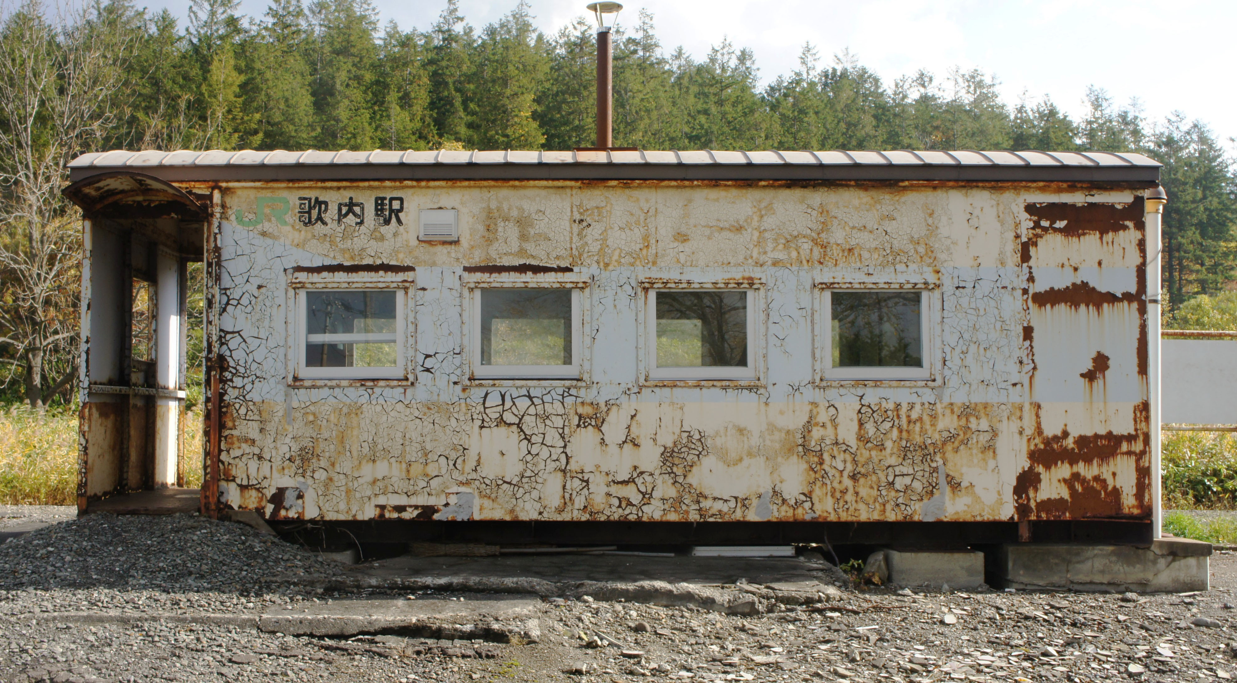 JR宗谷本線・歌内駅の駅前通りから見た駅舎 Sony NEX-3